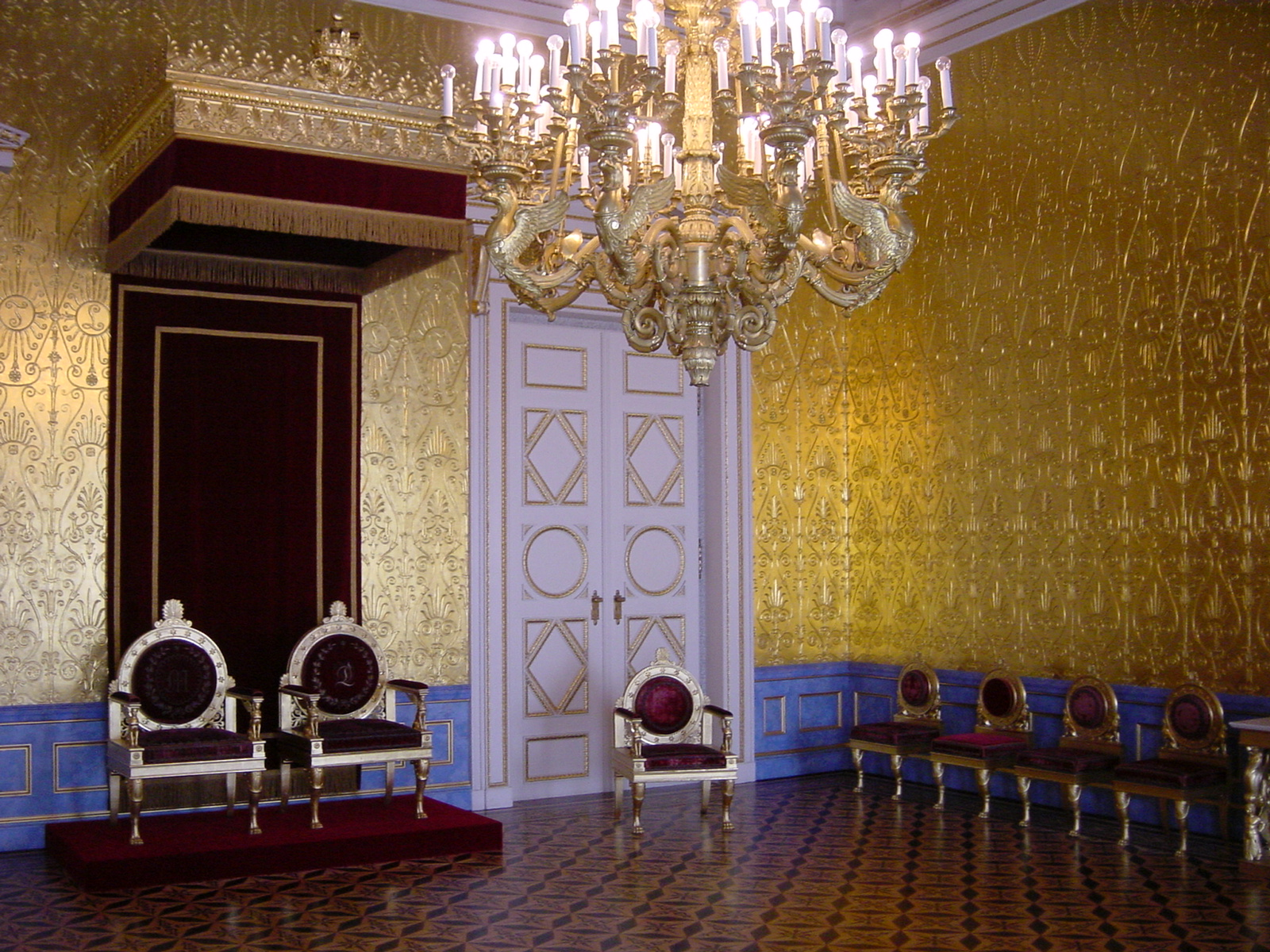 2003-08 München 065